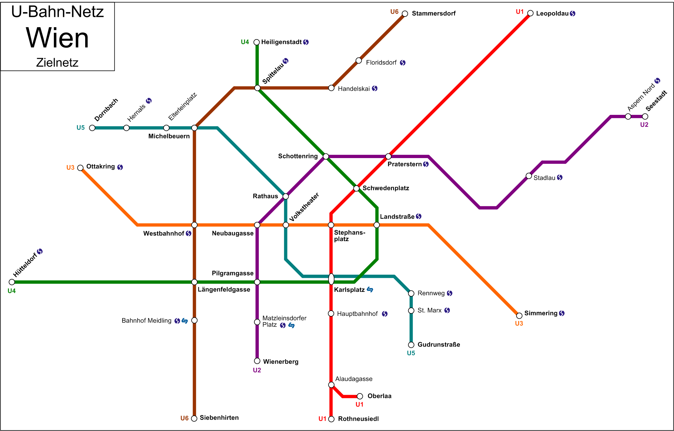 Wiener U-Bahn Zielnetz Angegeben sind nur die Endstationen sowie die Umsteigestationen zu U-Bahn, S-Bahn und Lokalbahn.